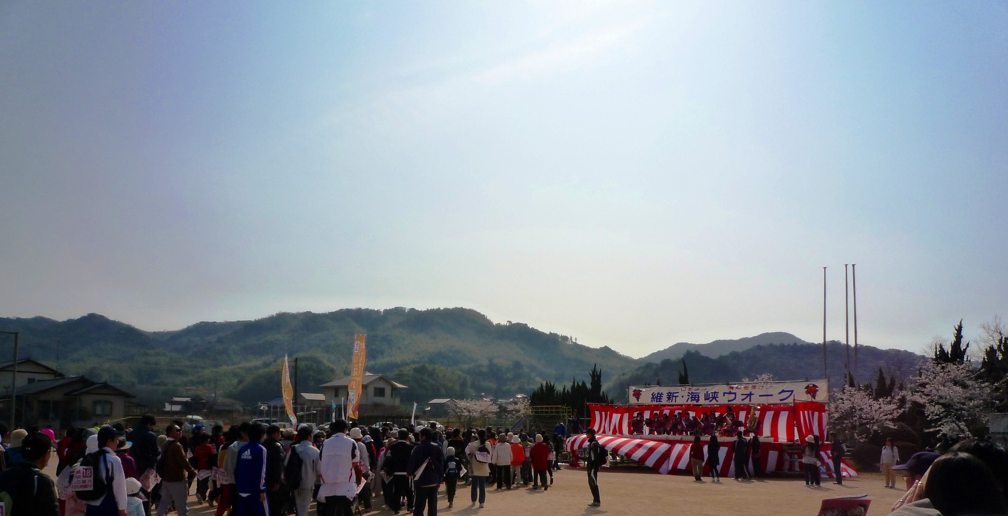 維新・海峡ウォークのスタート（出陣）の様子（第27回・2012年）